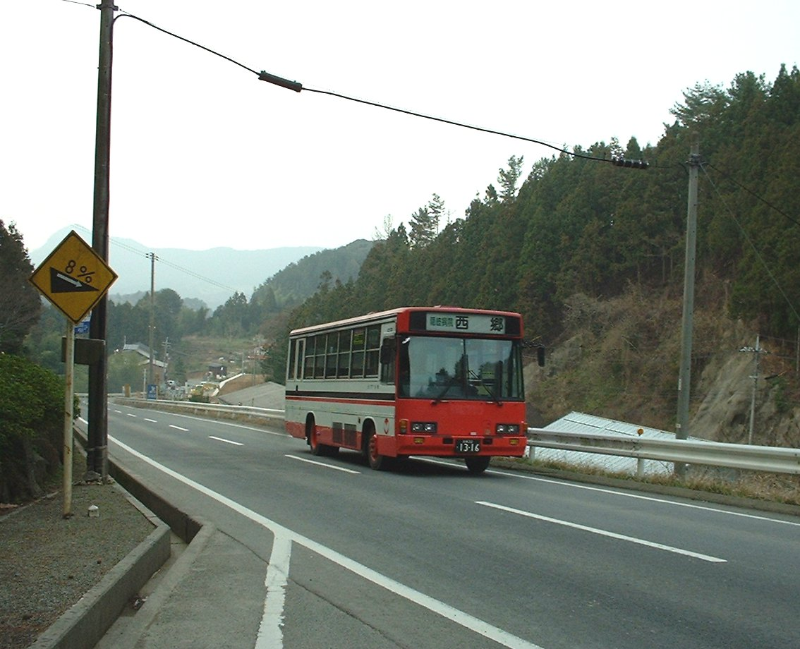 隠岐一畑交通バス 国道485号 五箇トンネル（都万目峠）北側付近